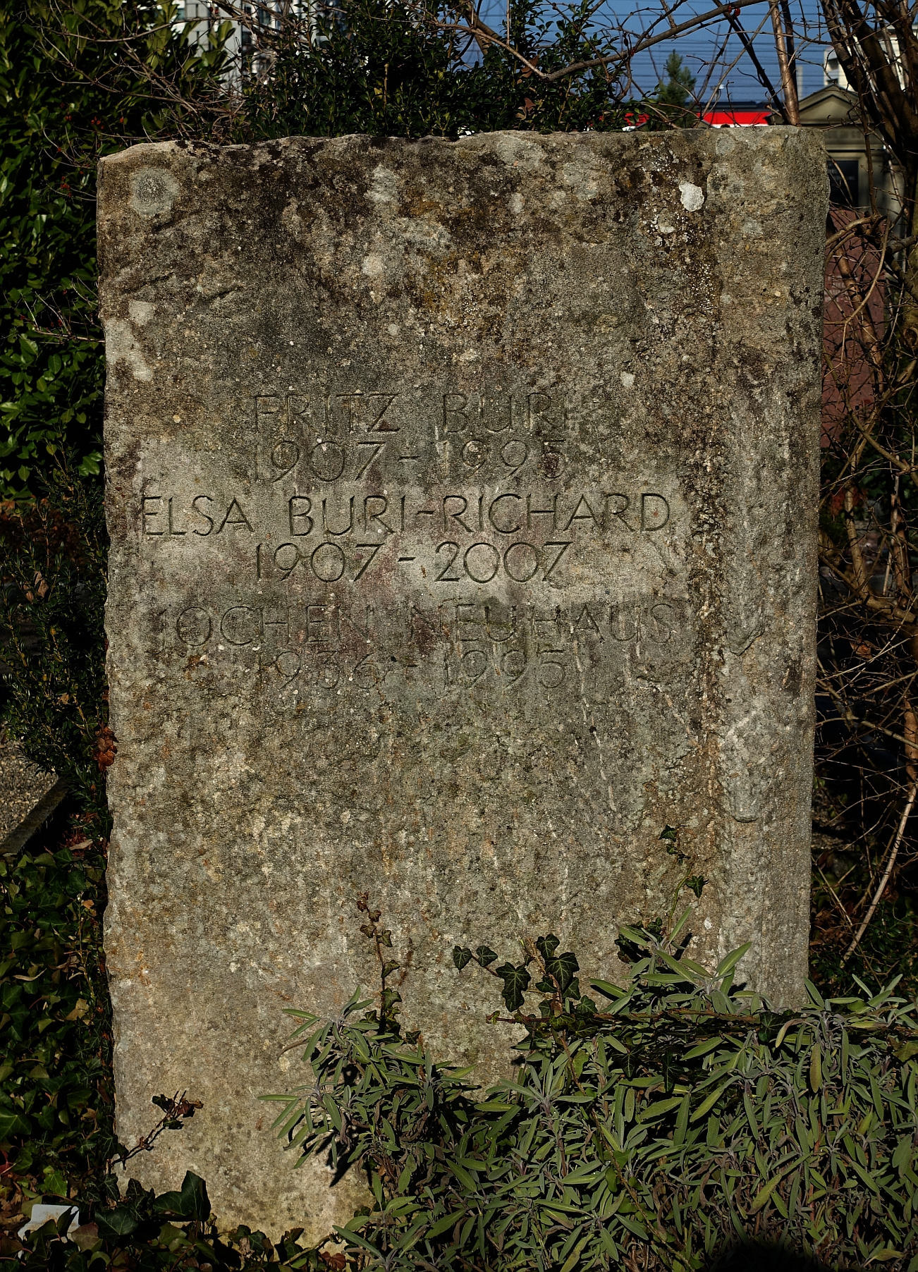 Fritz Buri-Richard (1907-1995), reformierter Pfarrer und Theologieprofessor. Elsa Buri-Richard (1907-2007) Grab auf dem Friedhof Wolfgottesacker, Basel.